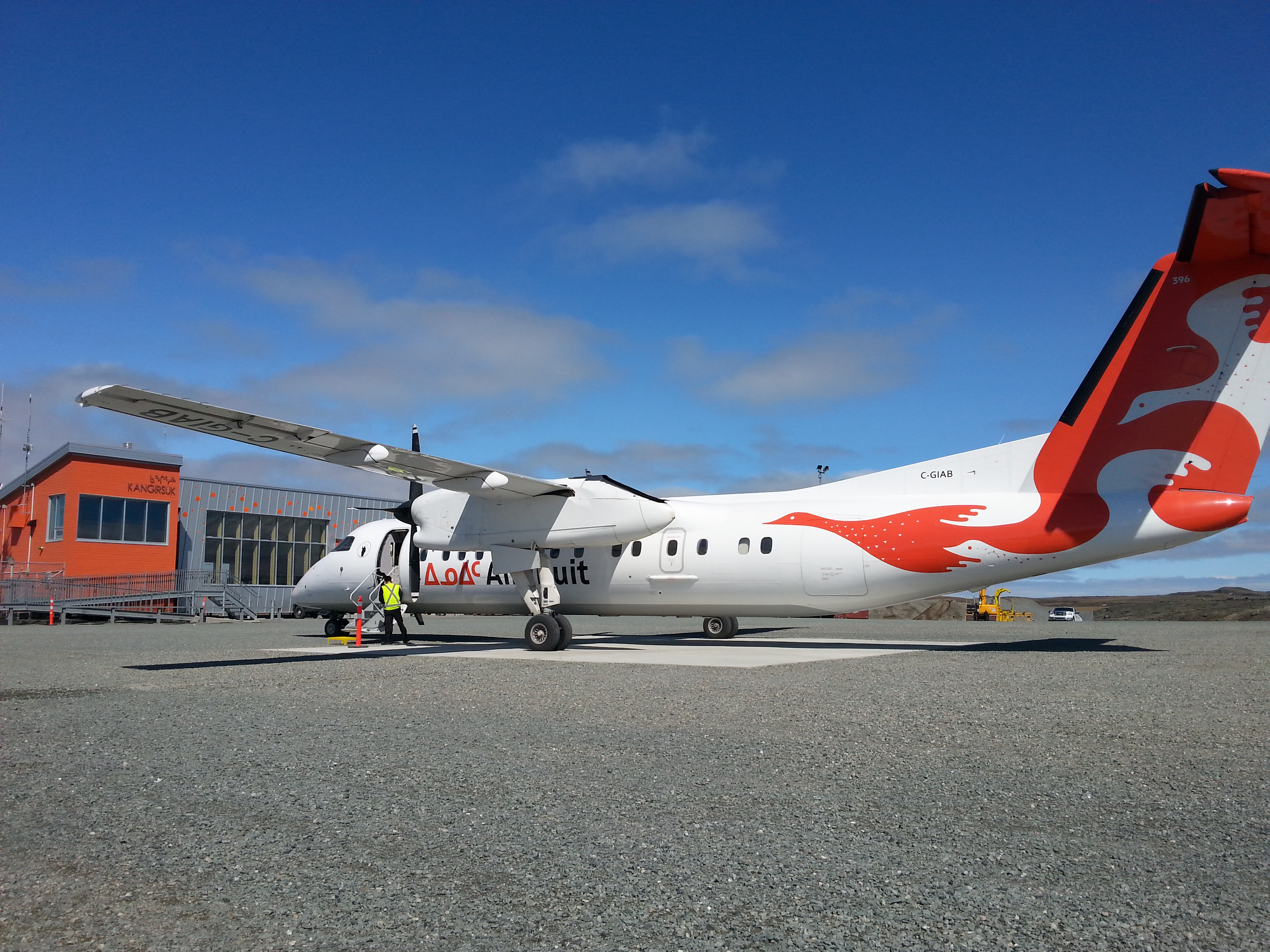 Dash 8-314 a CYAS